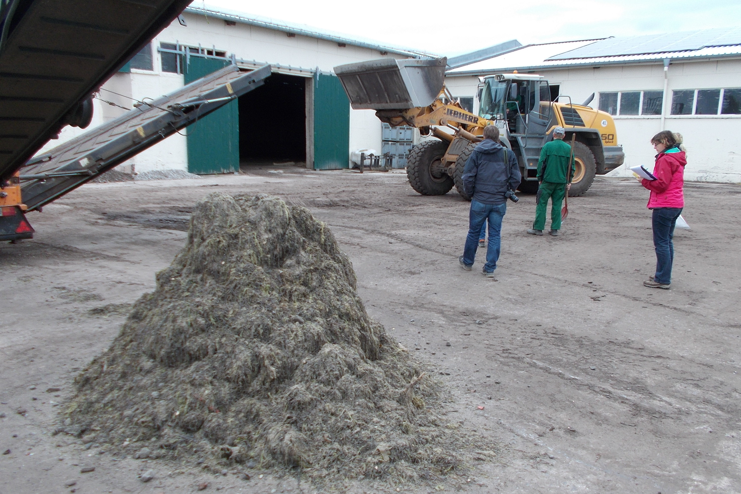 Siebrest (Biomasse und Steine) aus Strandräumgut bei einem Absiebeversuch.